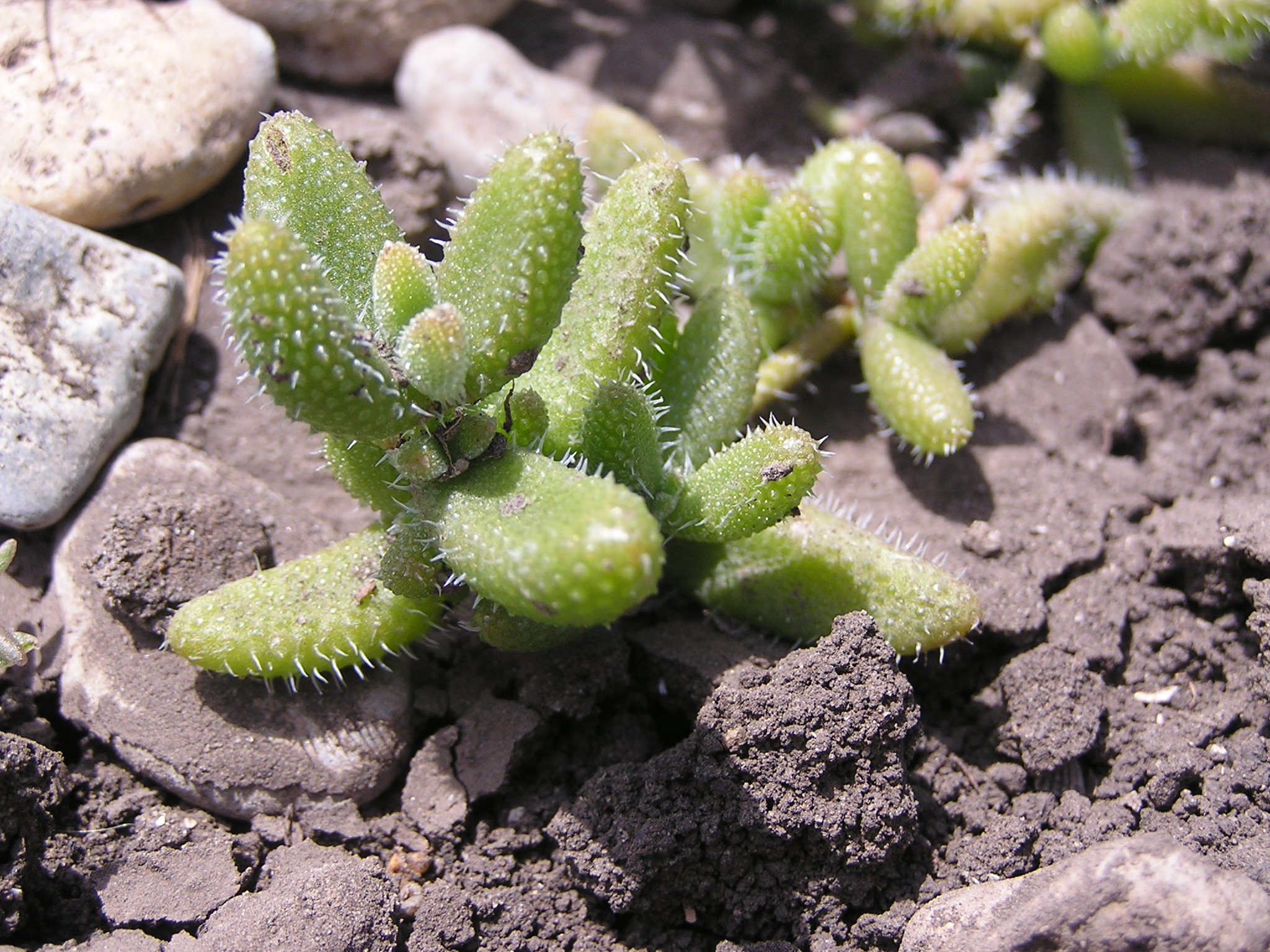 Растение в Седово.